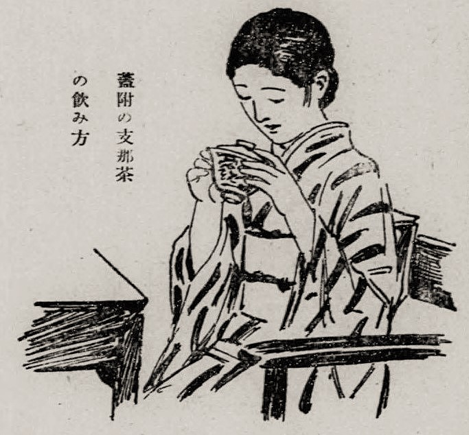 蓋つき中国茶の飲み方